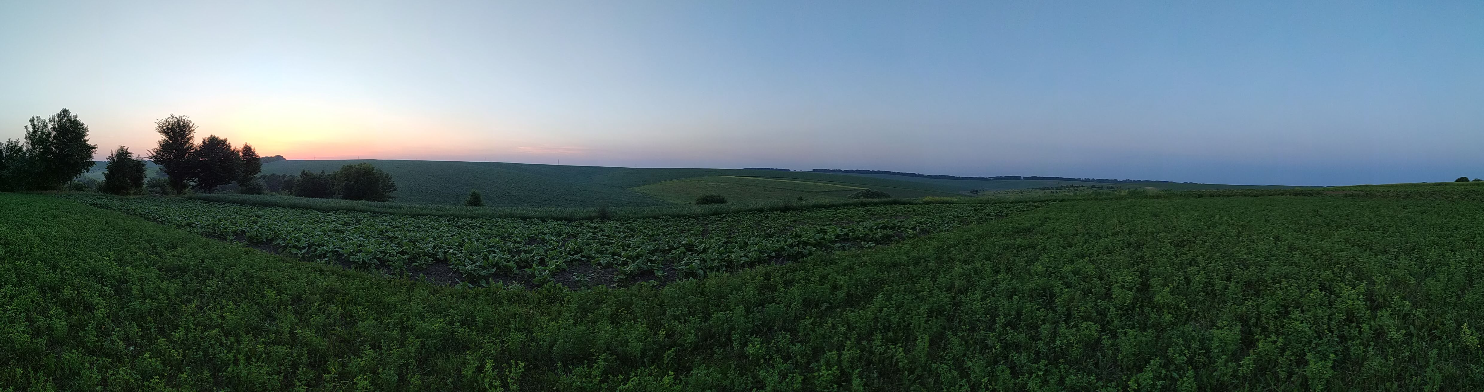 Панорама з північної сторони села